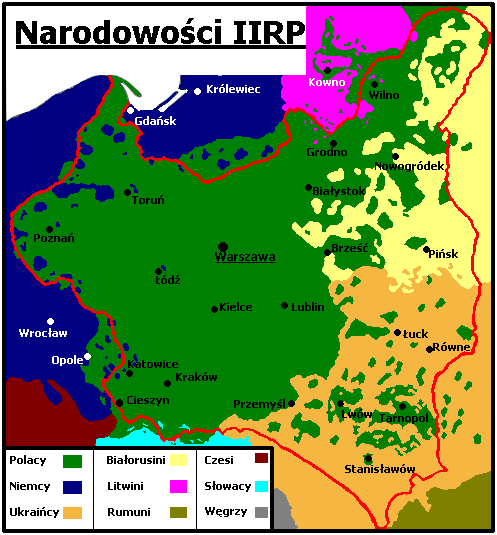 Narody w II Rzeczypospolitej